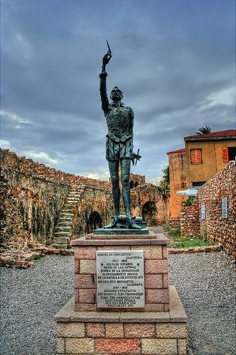 Nafpaktos_evlahos